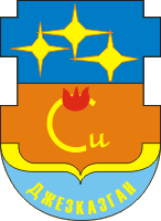 Wappen der Stadt Sheskasgan